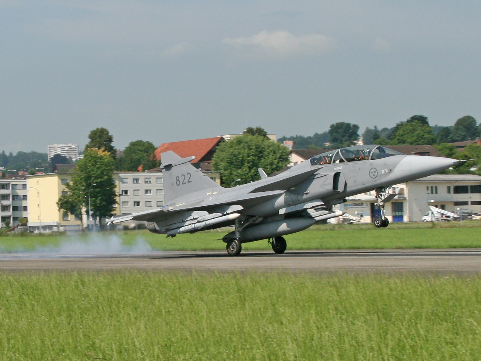 Sweden Air Force Saab JAS 39D Gripen 822